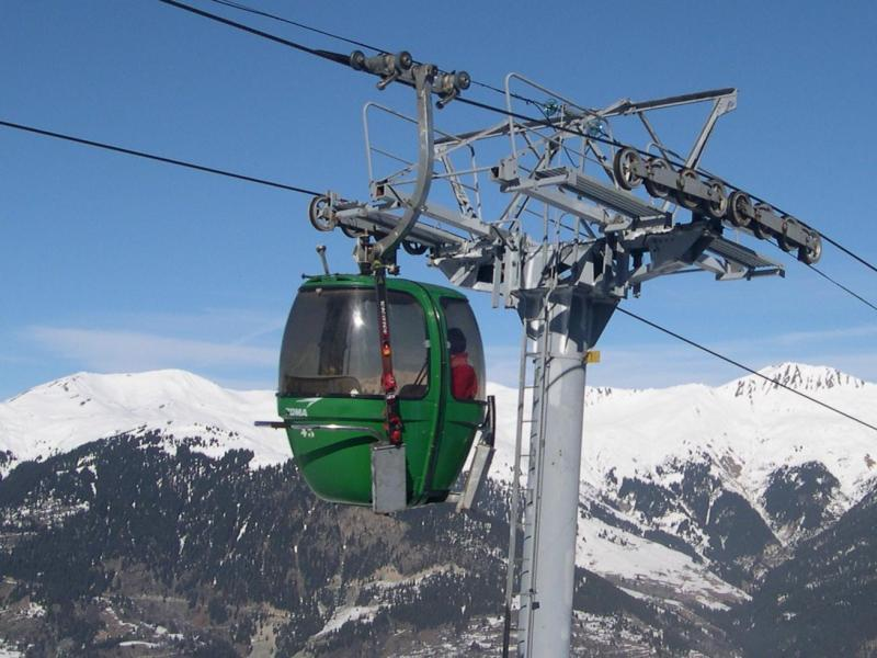 Télécabine à Courchevel, Savoie, France. Photographie par Alain Caraco - 15/02/2004